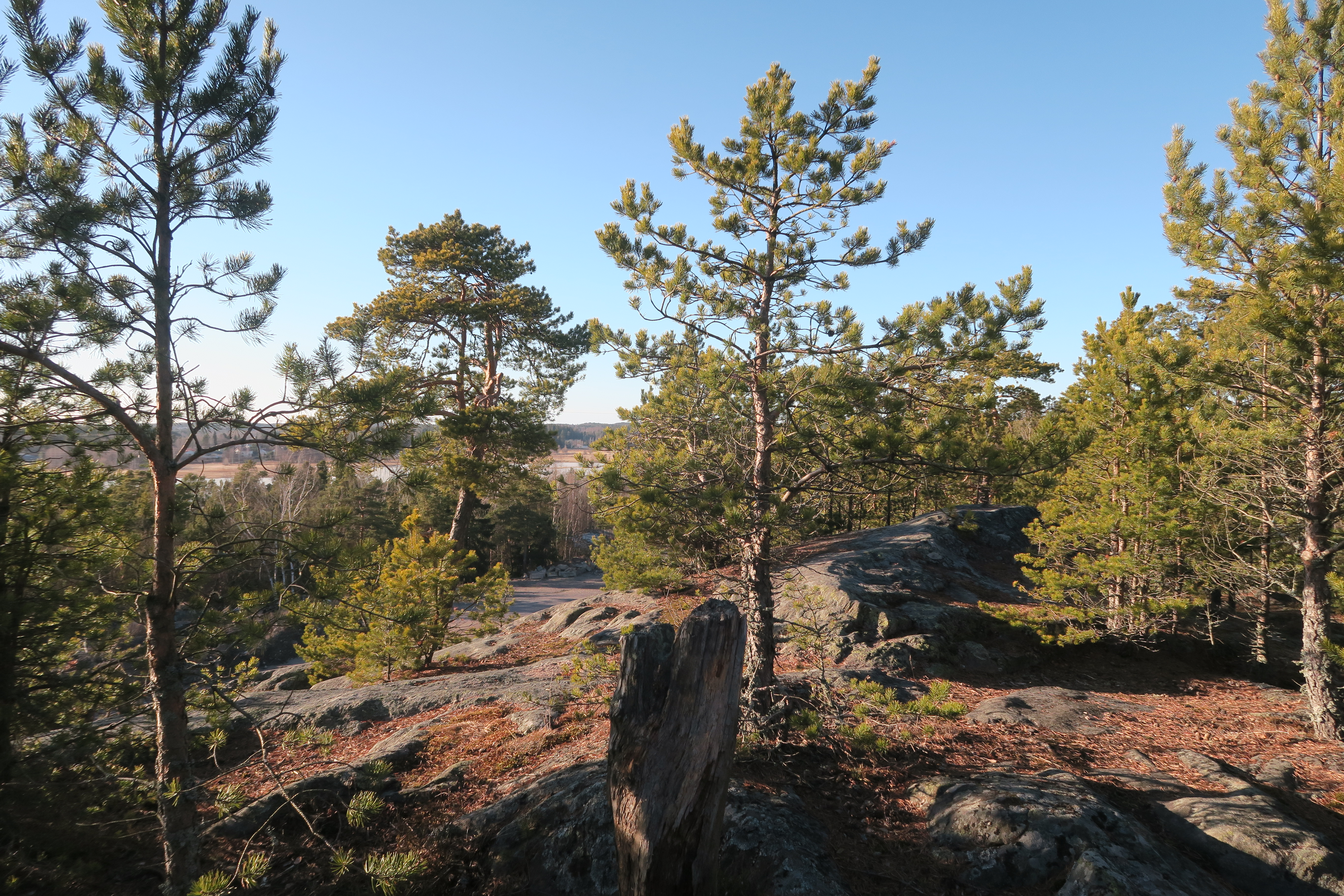 Temppelivuori, Raisio,vuoren huippu 25.3.2017.